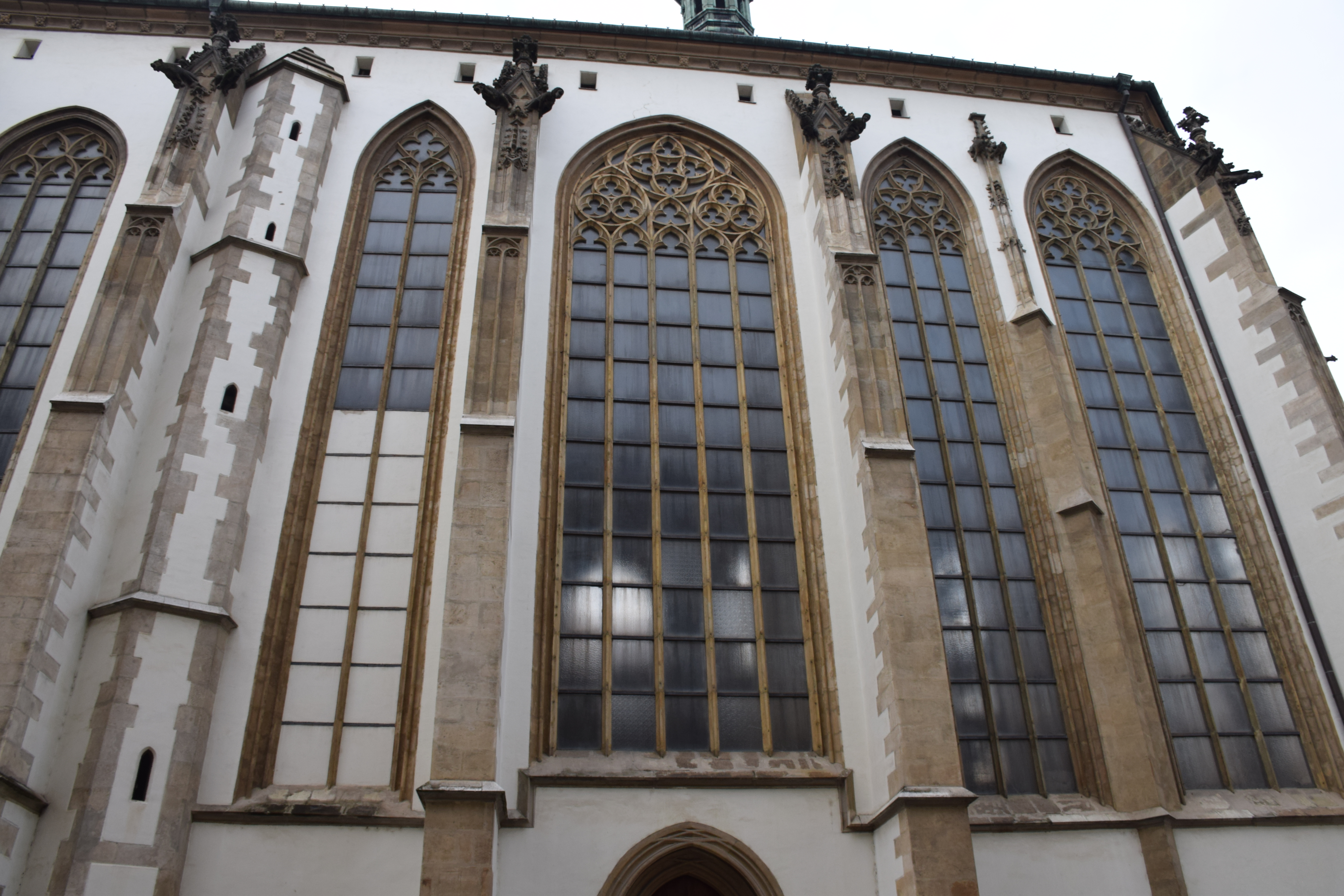 gotická okna svatý Jakub